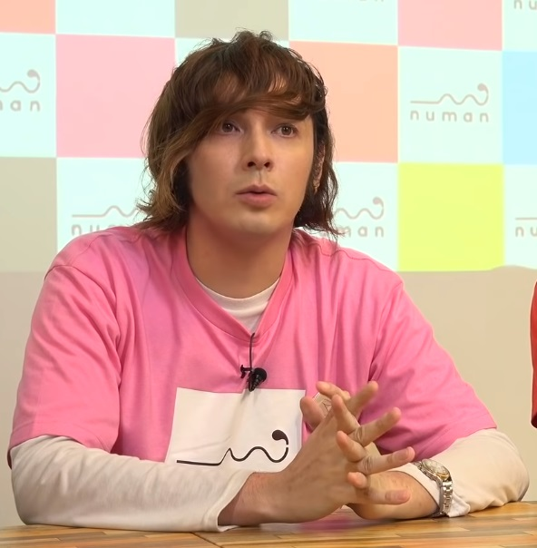 バレッタ裕（『ぬまてれ☆』第5回前編より）